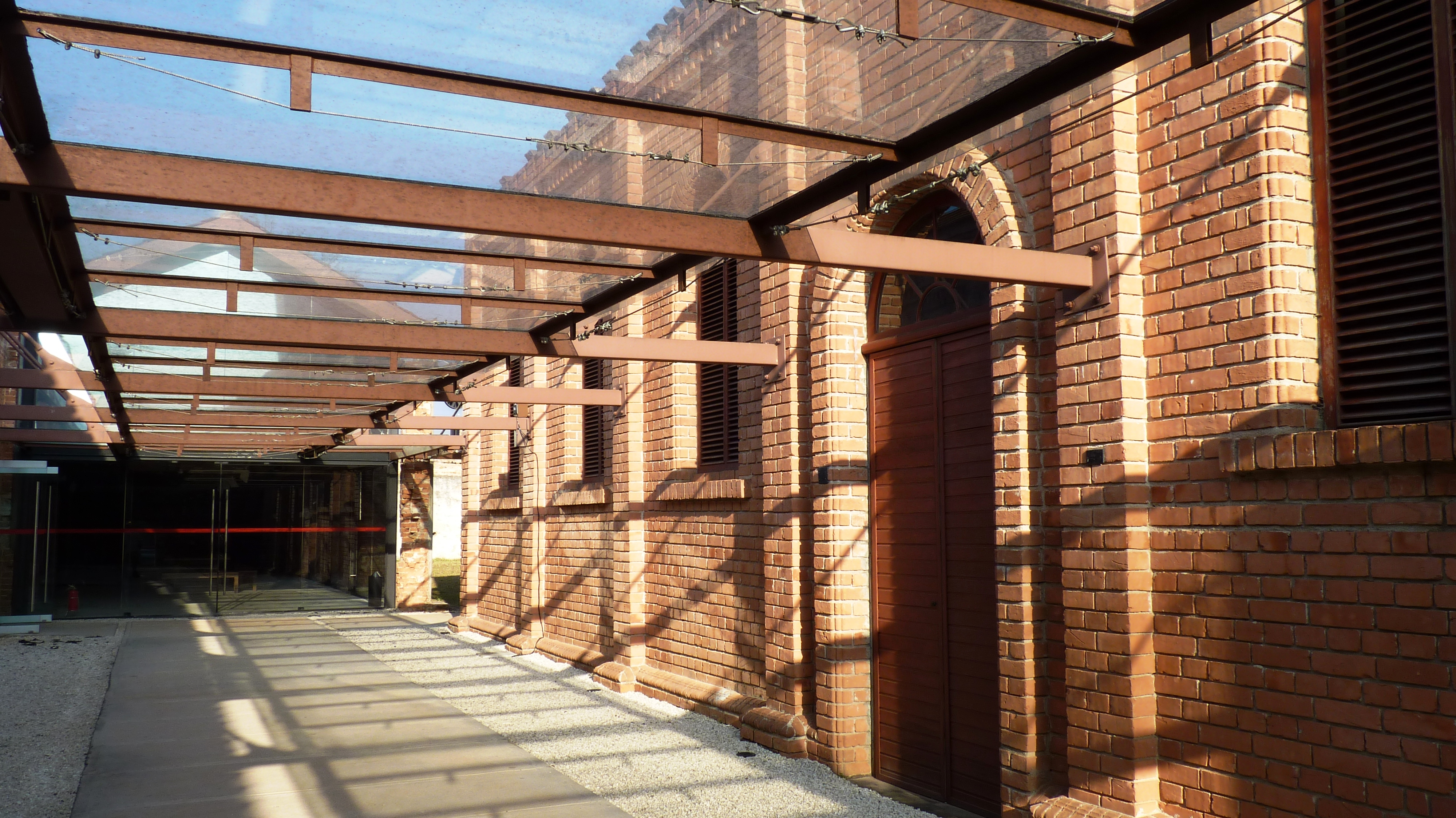 Vila Mariana - São Paulo